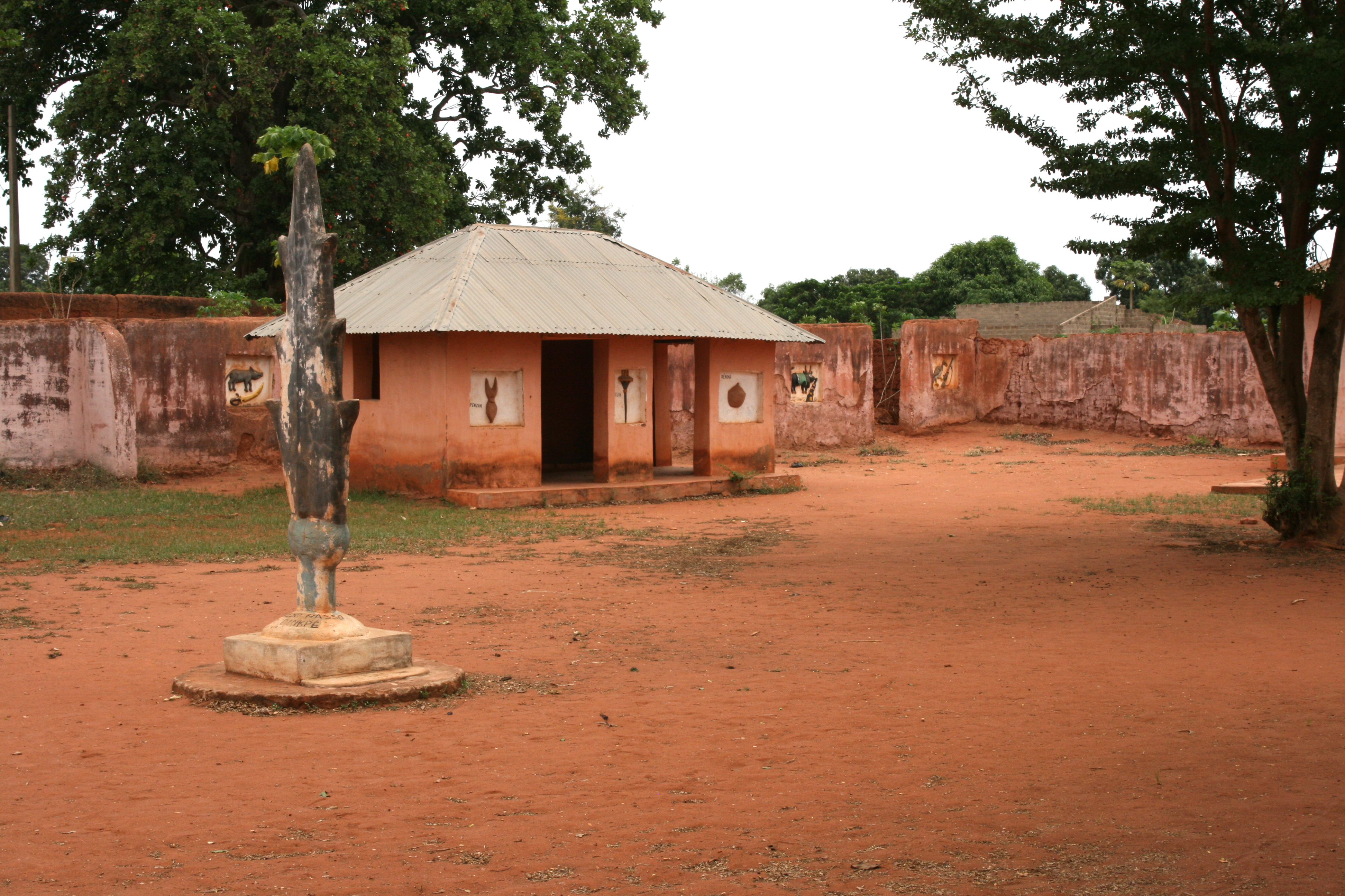 Königspalast in Abomey, Benin. Weltkulturerbe.